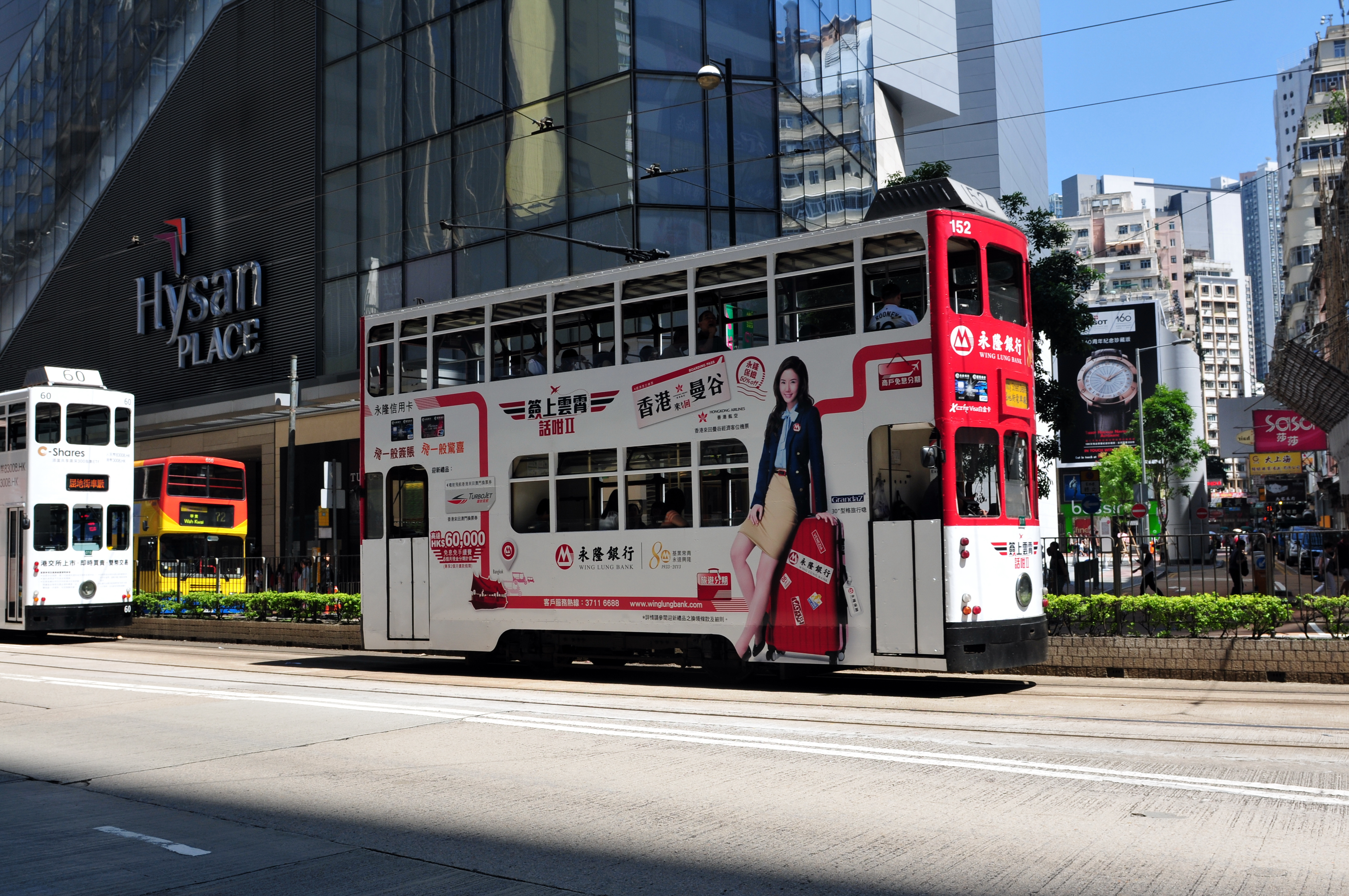 Wikimania 2013 Hongkong